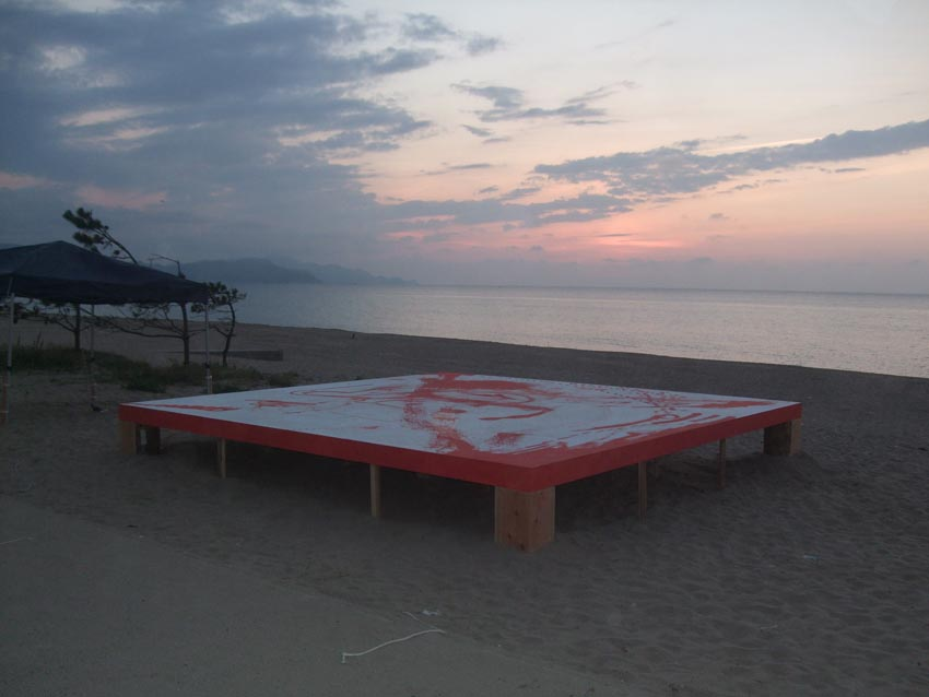 茜色のペイント作品